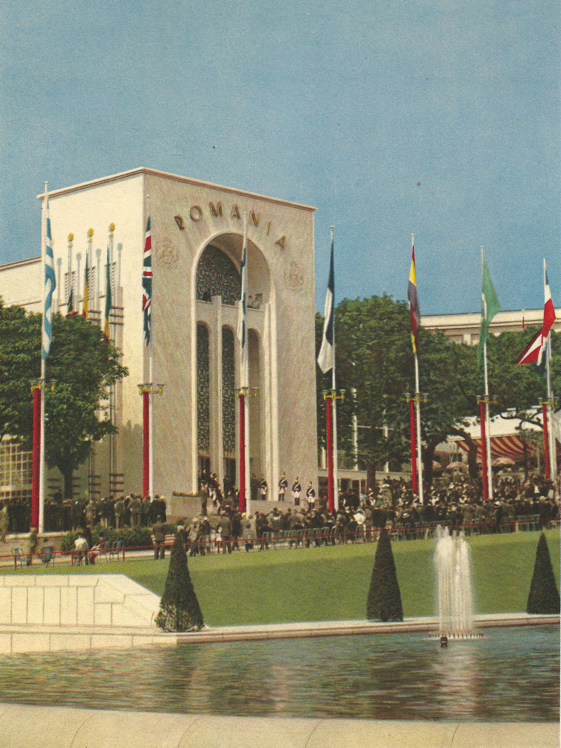 Exposition Internationale des Arts et Techniques dans la Vie Moderne (Paris-1937), le pavillon de la Roumanie.